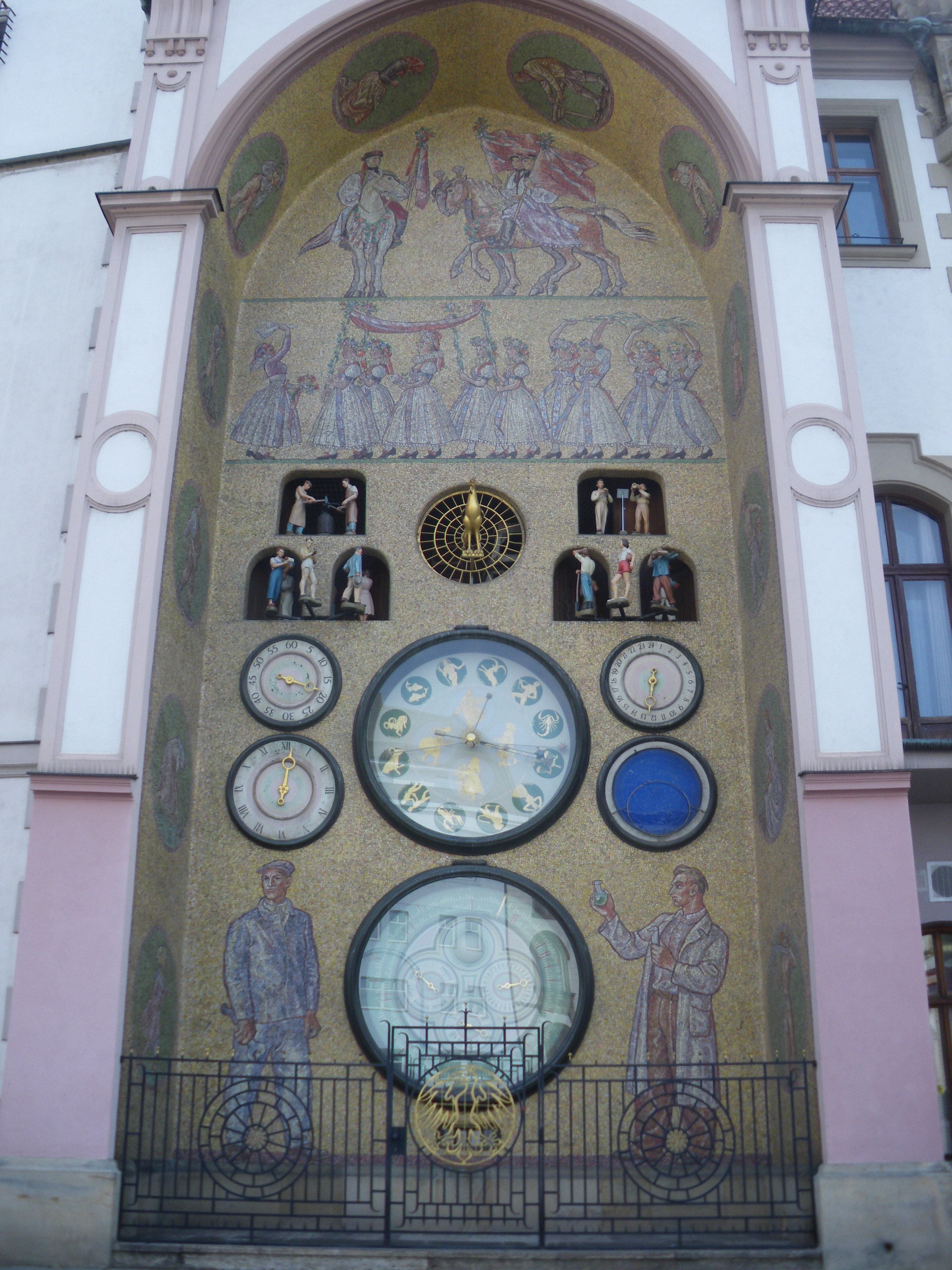 Orloj, reloj astronómico que data del año 1420.